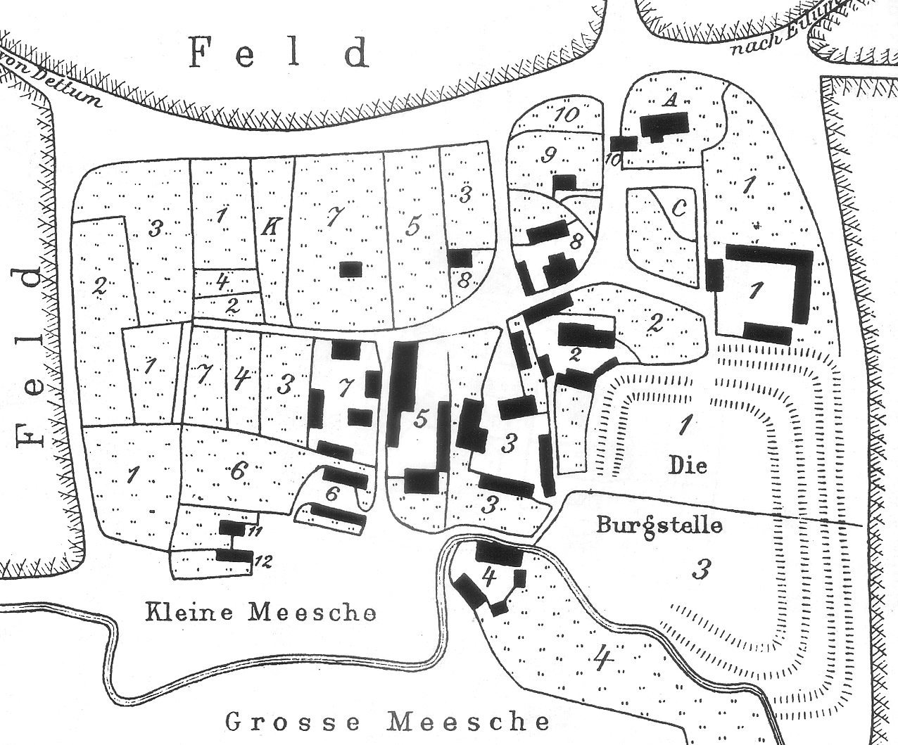 Weferlingen (Niedersachsen), A Kirche, C Pfarrwitwe, 1 und 3 und 5 und 7 Ackerleute, 2 Halbspänner, 4 und 6 und 8 und 9 Kotleute, 10 Schule, 11 Hirte, 12 Landsoldatenhaus der Gemeinde